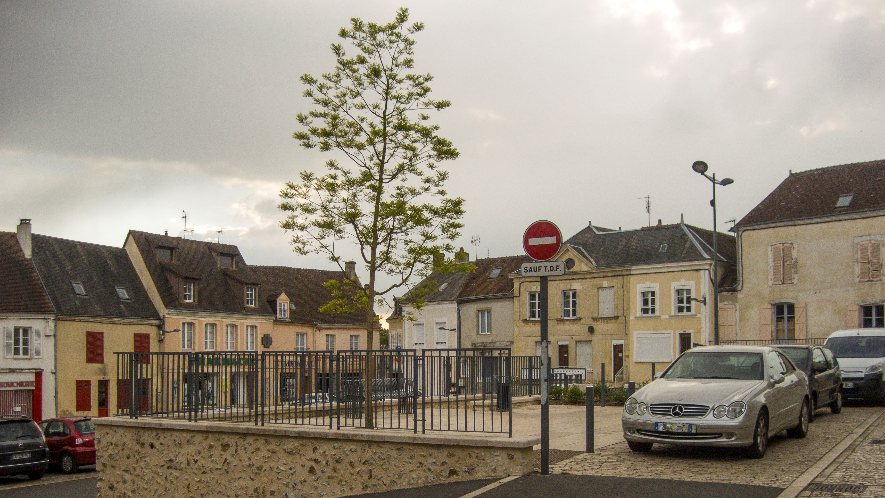 Place du Marché à Authon du Perche, france